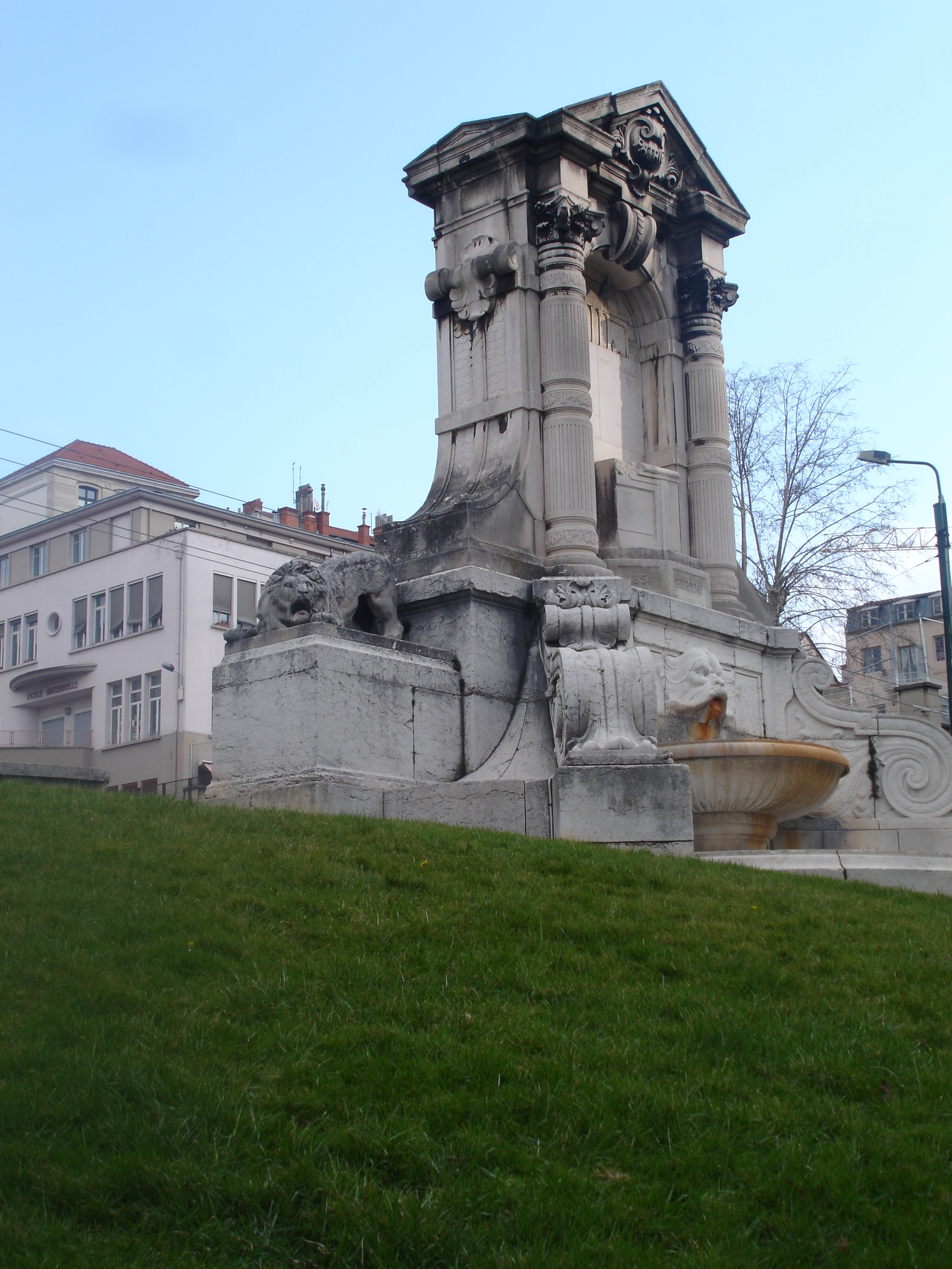 Lyon : monument au jardin des plantes